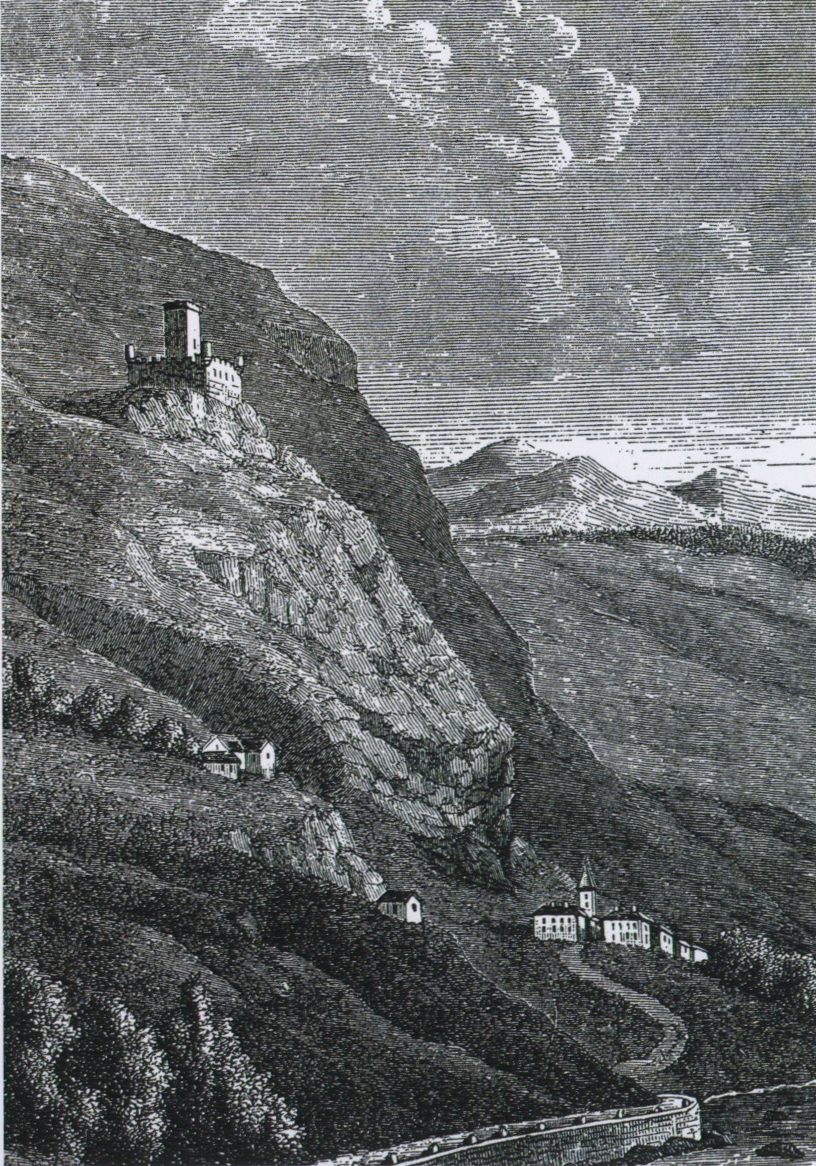 "Chambave: Chateau de Cly", litografia di E. Aubert in E. Aubert, La Vallée d'Aoste, Parsi, 1860.